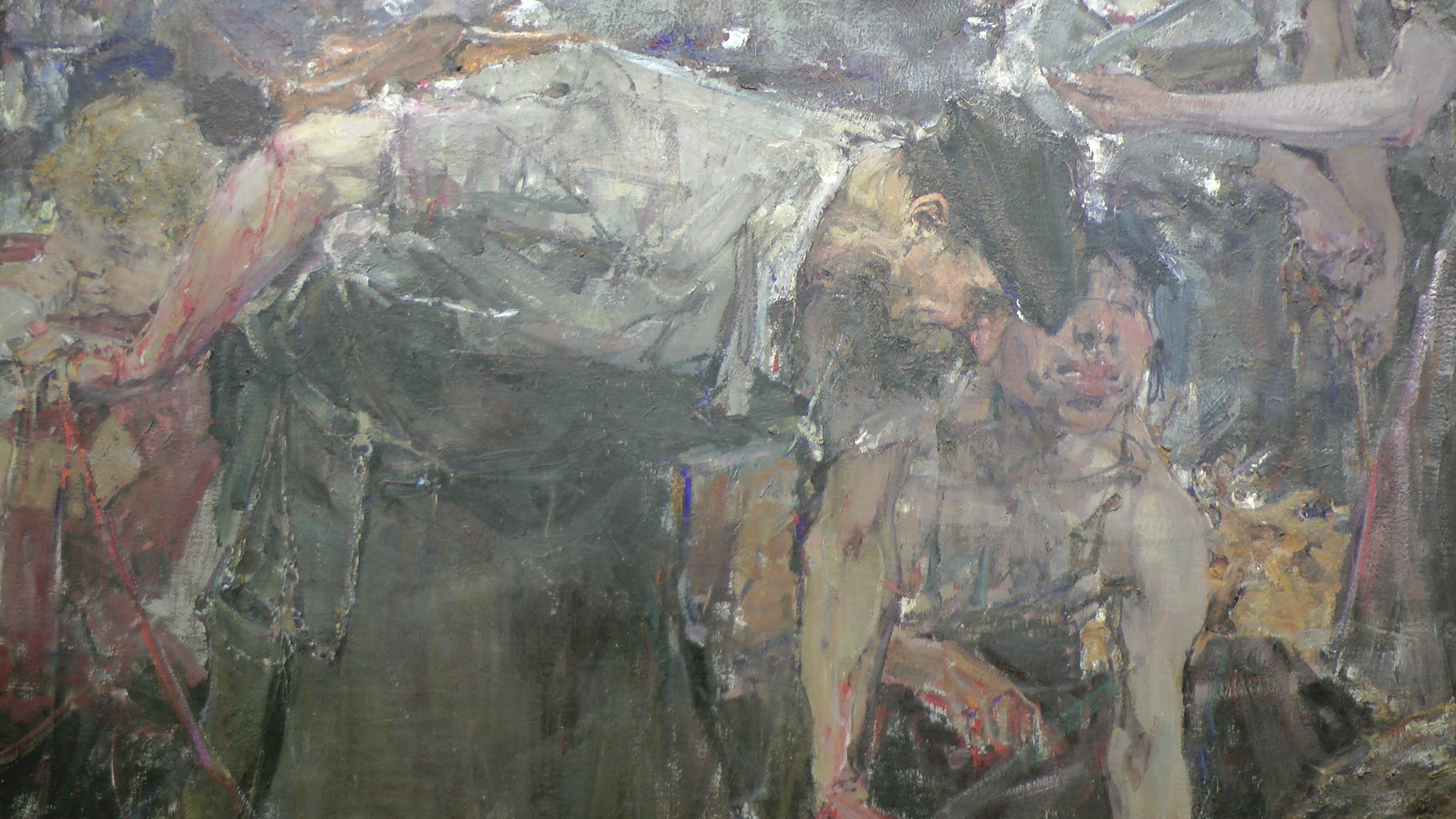 Бойня (фрагмент картины Николая Фешина). Два работника над тушей быка